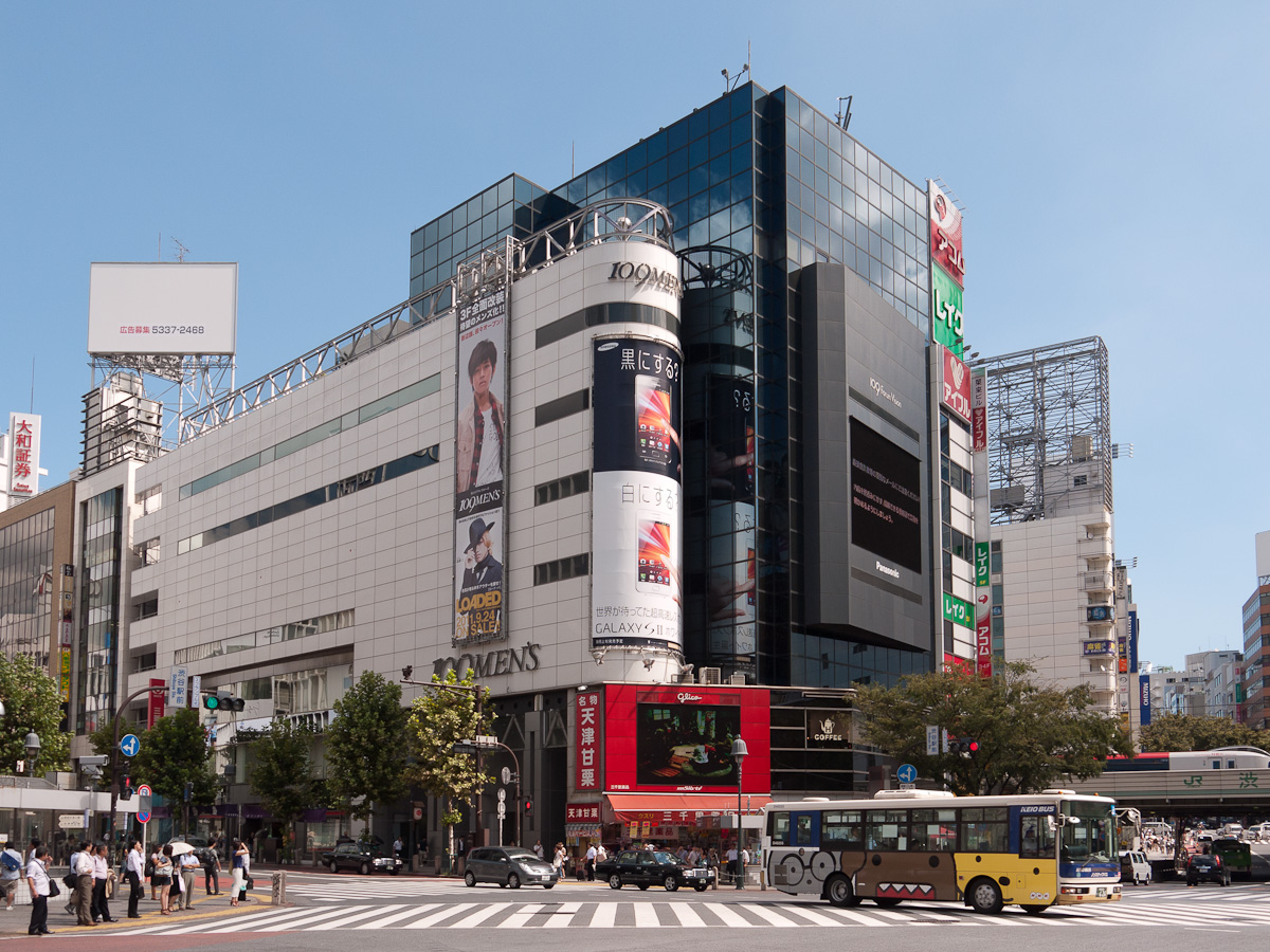 Shibuya 109-2。